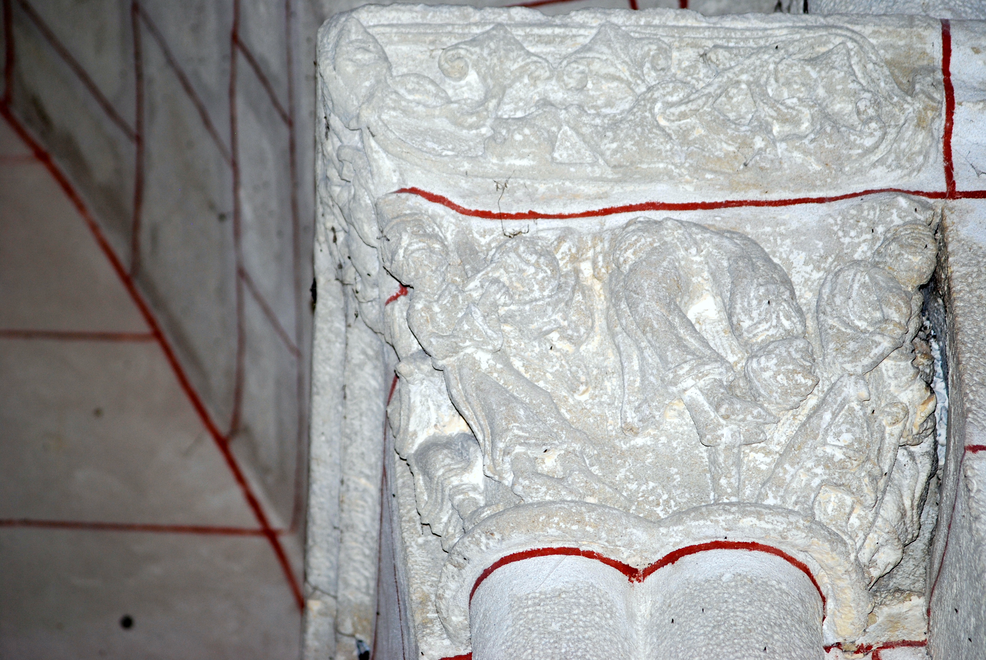 Église Notre-Dame de Doulezon